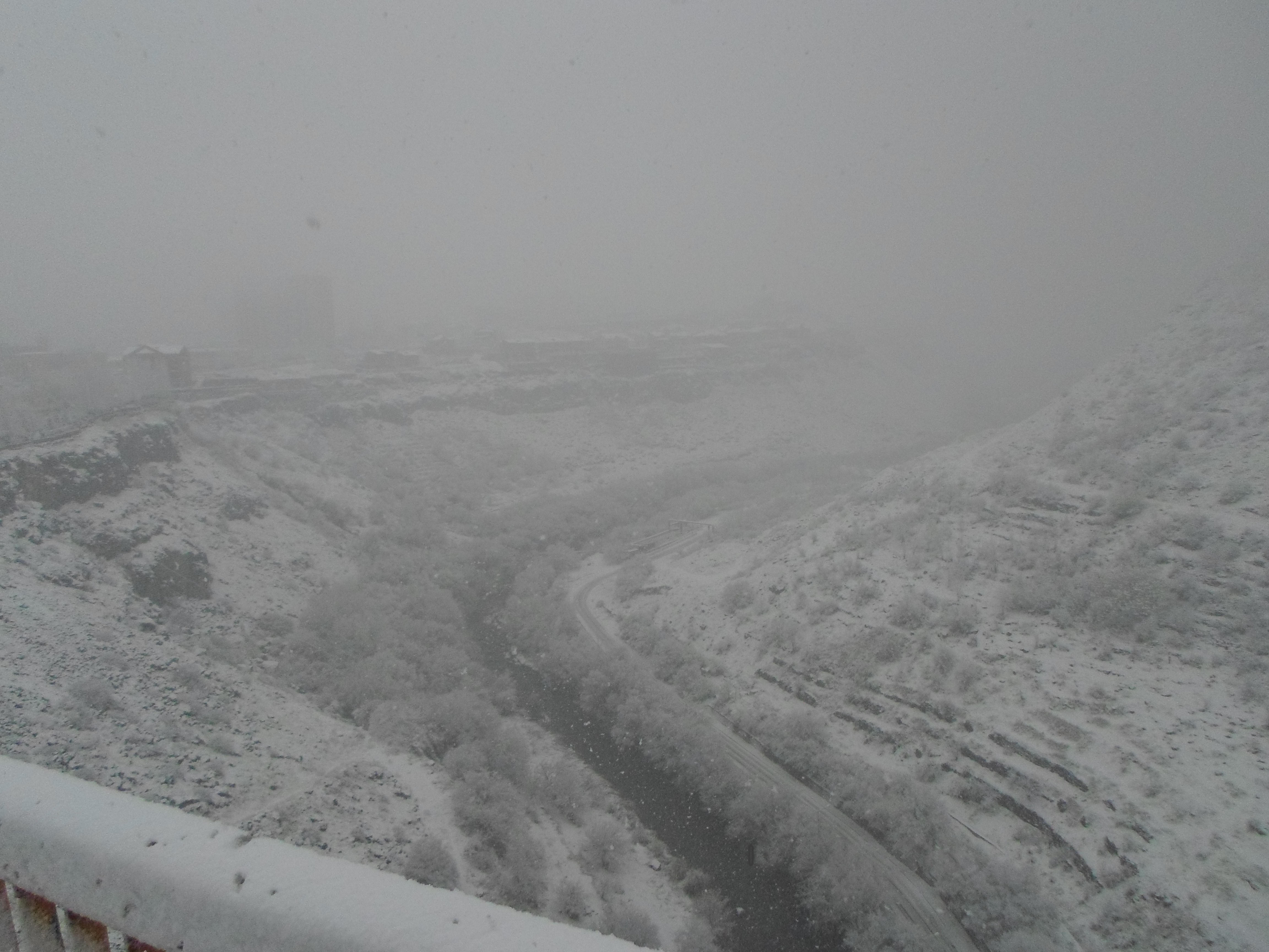 Долина реки Раздан во время снега (снимок сделан с моста Давташена, первый снег в 2013 году в Ереване).